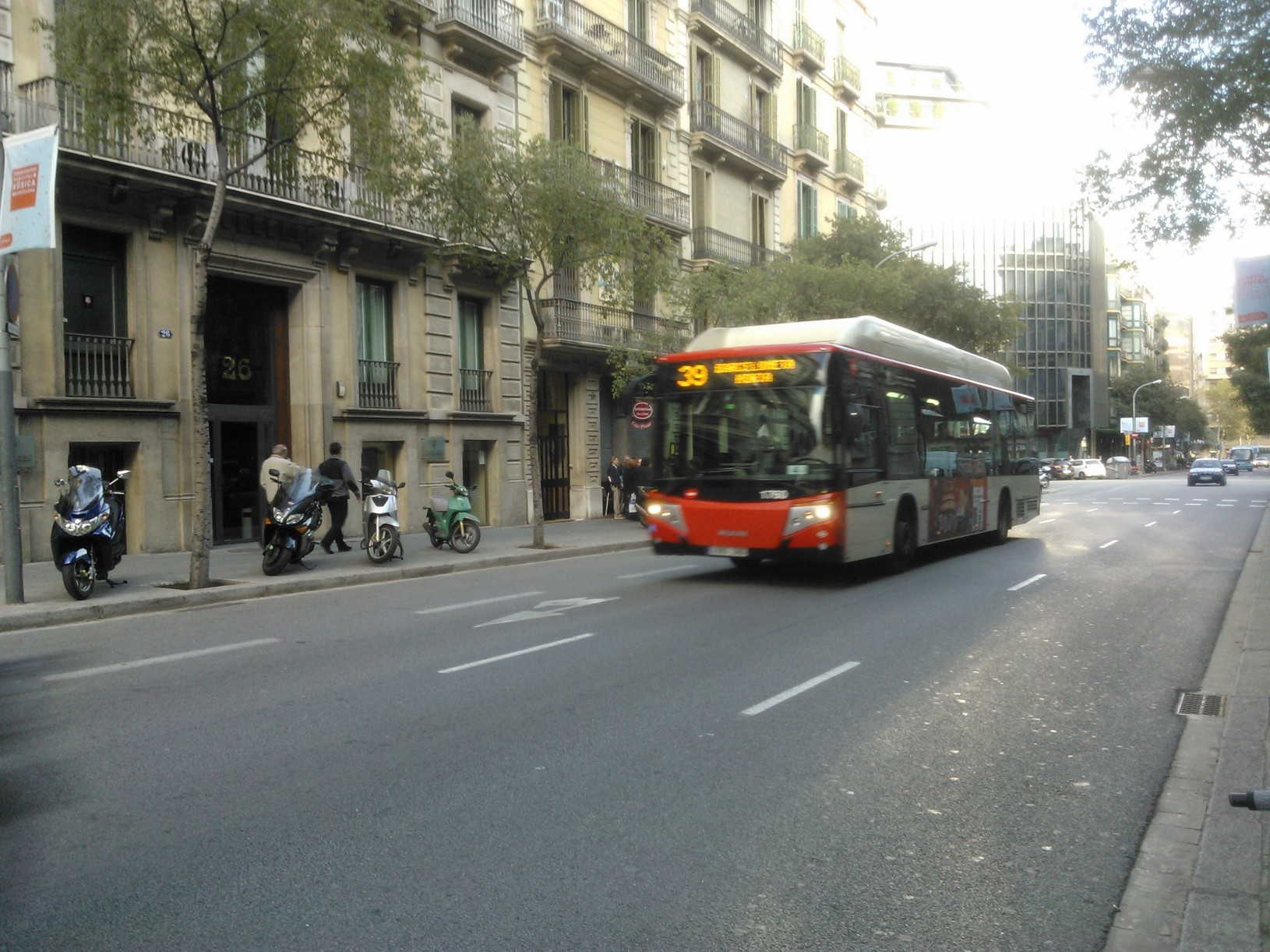 Autobús urbà de Barcelona